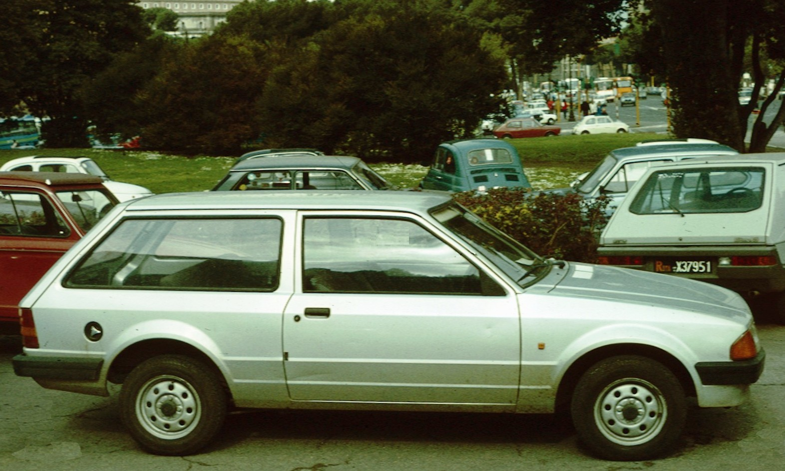 Ford Escort 3, 3 door estate